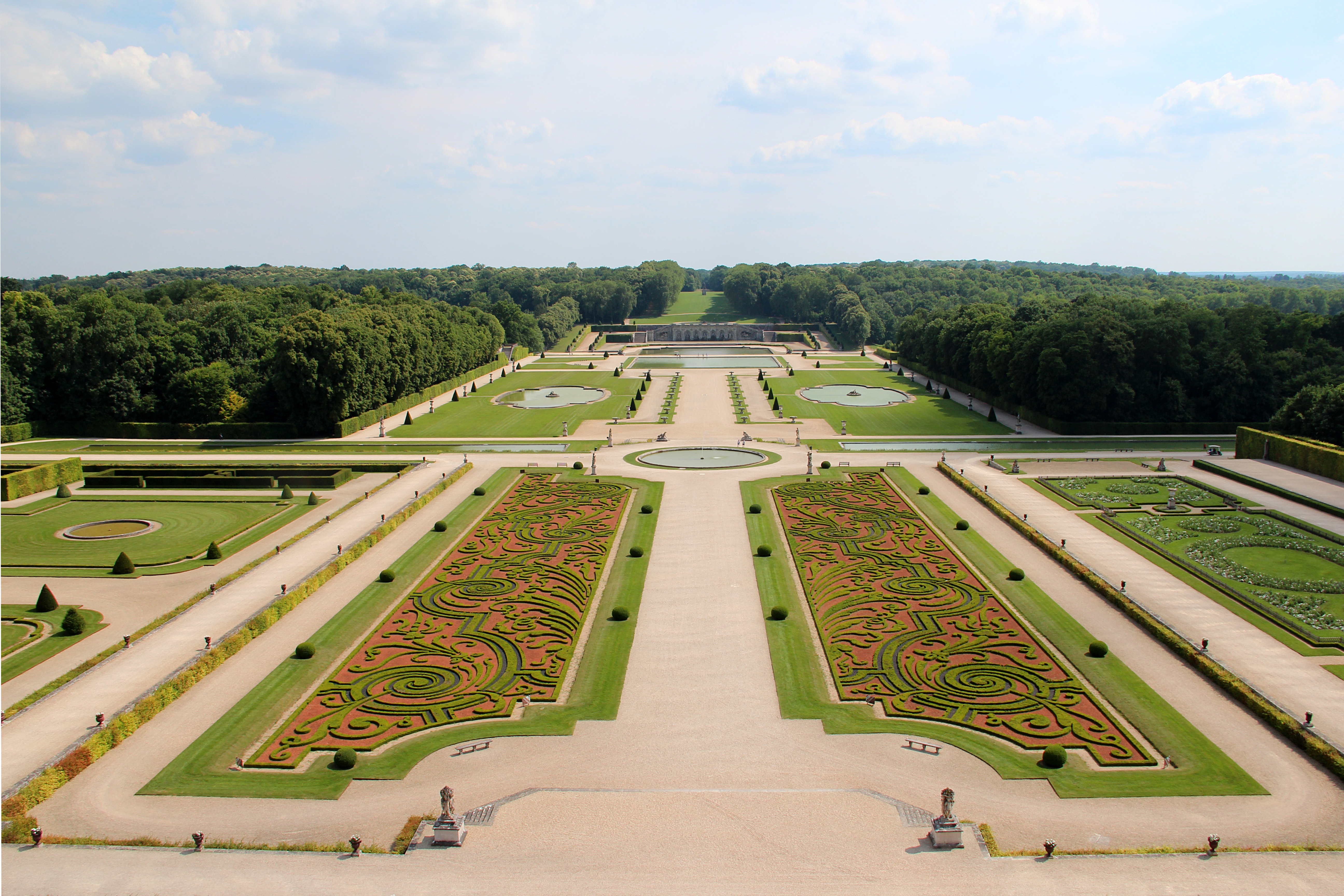 Les jardins du château de Vaux-le-Vicomte - Maincy (Seine-et-Marne, France).